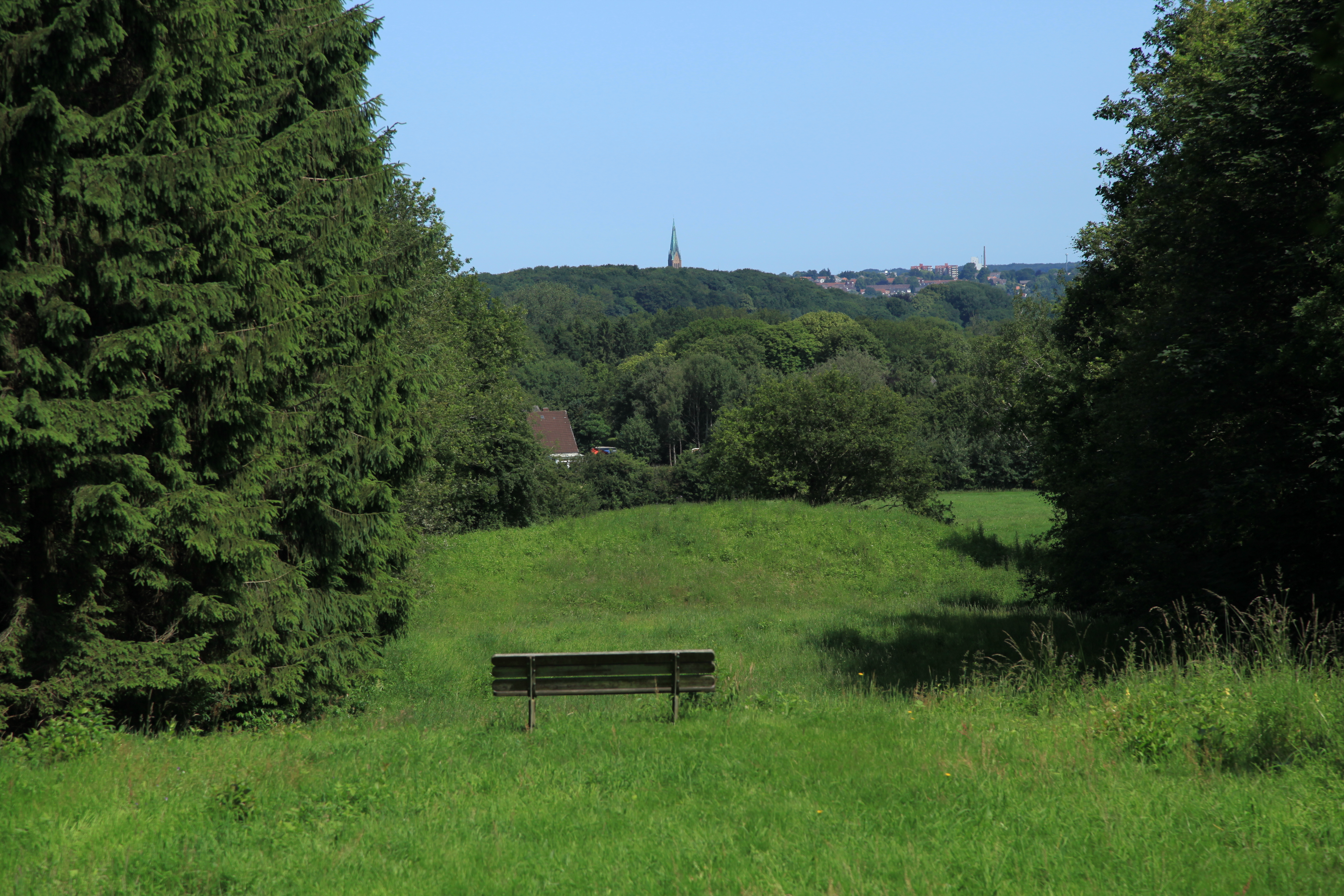 Blick vom Königshügel in Selk nach Schleswig